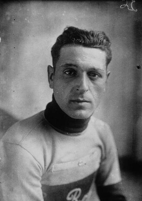 Michele Orecchia lors du Tour de France 1929